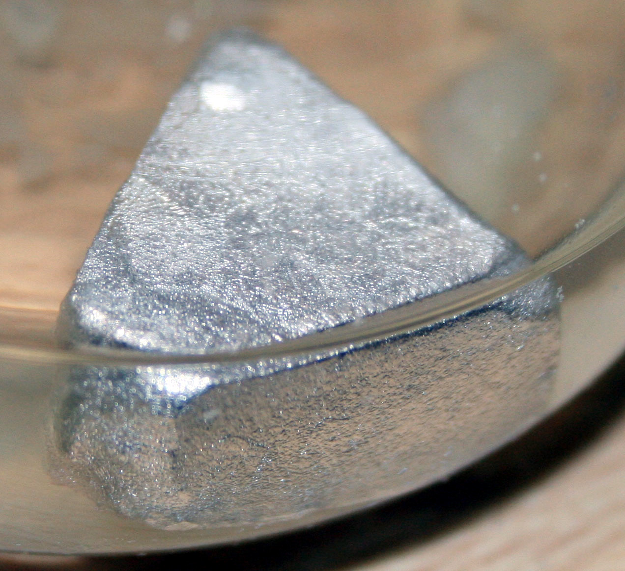 Kalium unter Tetrahydrofuran und Schutzgas